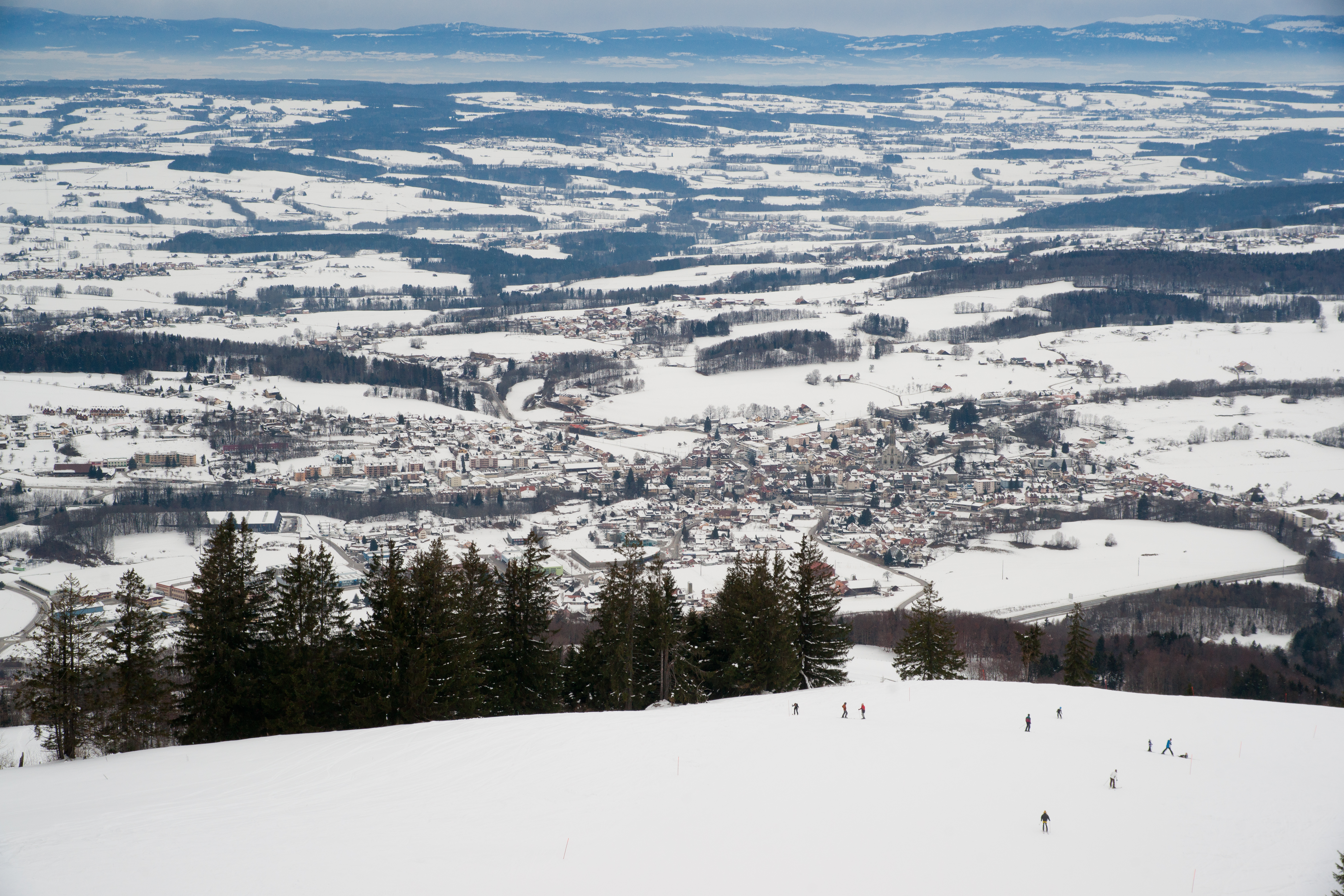 Châtel-Saint-Denis vu depuis la Corbetta.